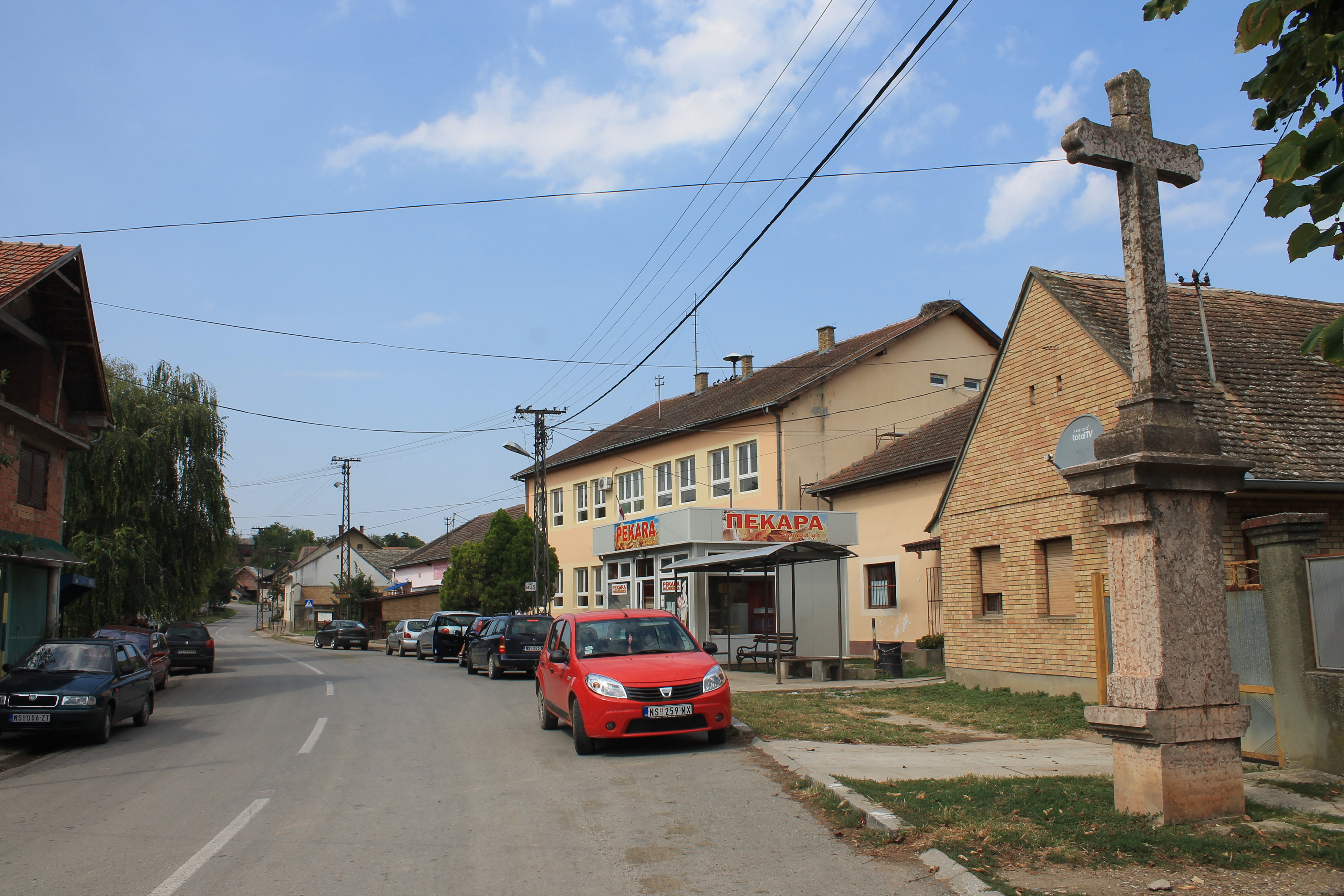 Susek